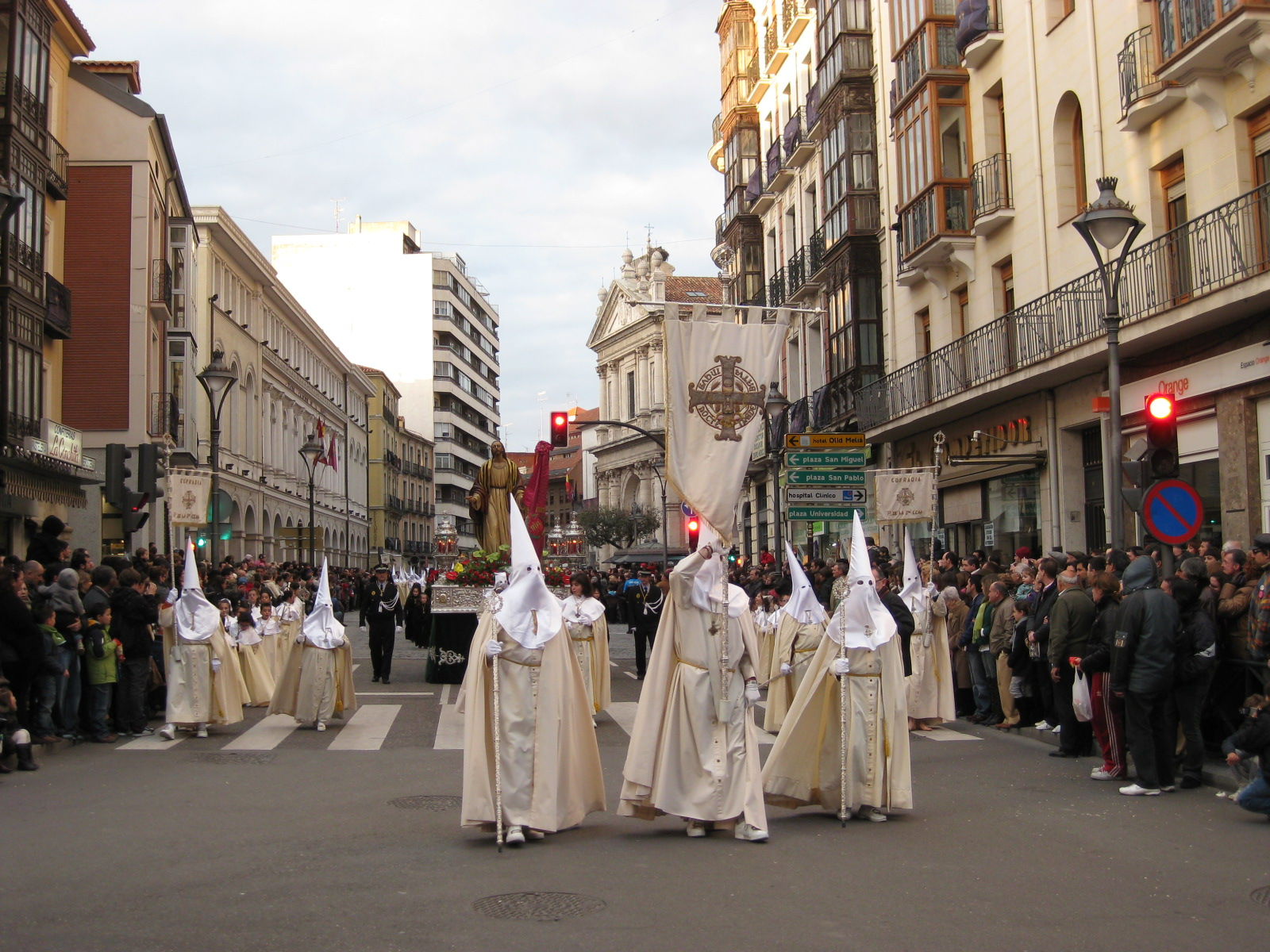 Cabecera de la procesión de la Sagrada Cena. Jueves Santo. Cofradía Penitencial y Sacramental de la Sagrada Cena, Valladolid (España).